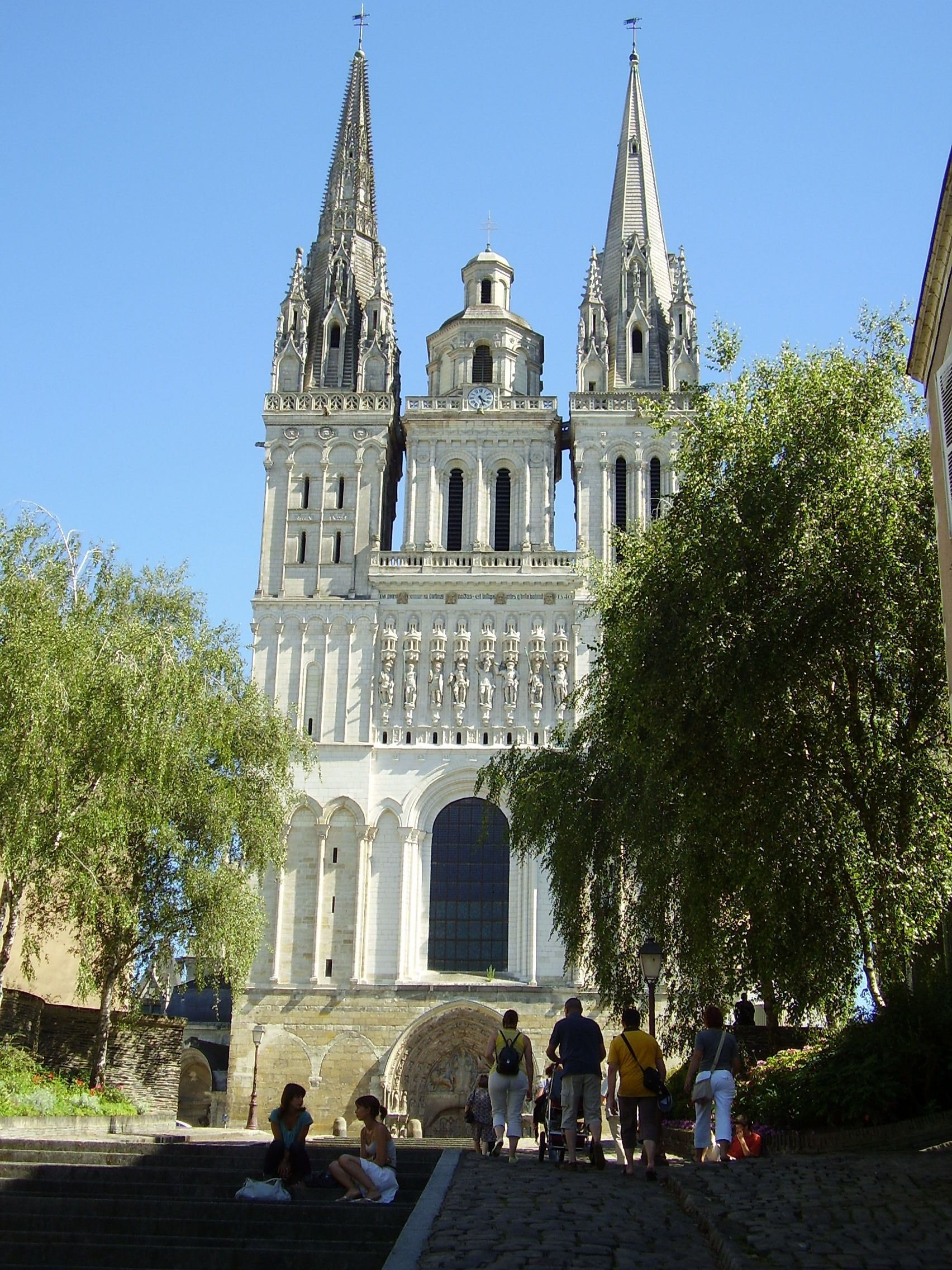 Angers, France